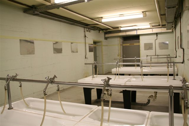 Waschraum in der S-Bahn-Haltestelle Reeperbahn in St. Pauli.